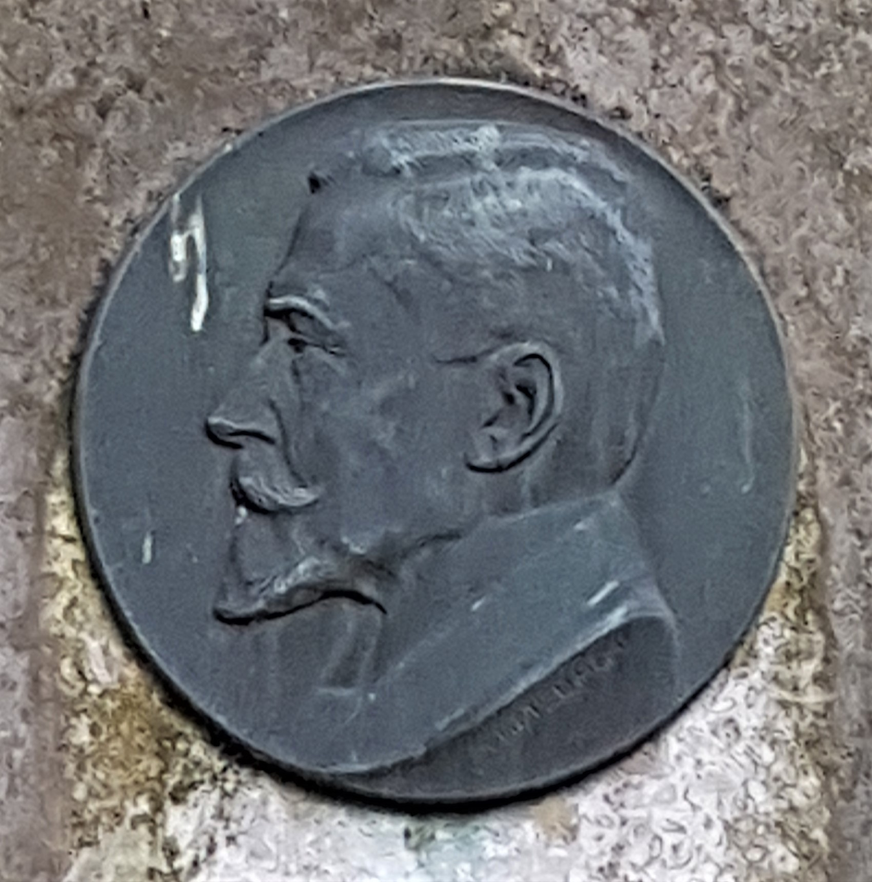 Porträtmedaillon auf dem Grabmal von Carl Johannes Schlenker auf dem Waldfriedhof Stuttgart